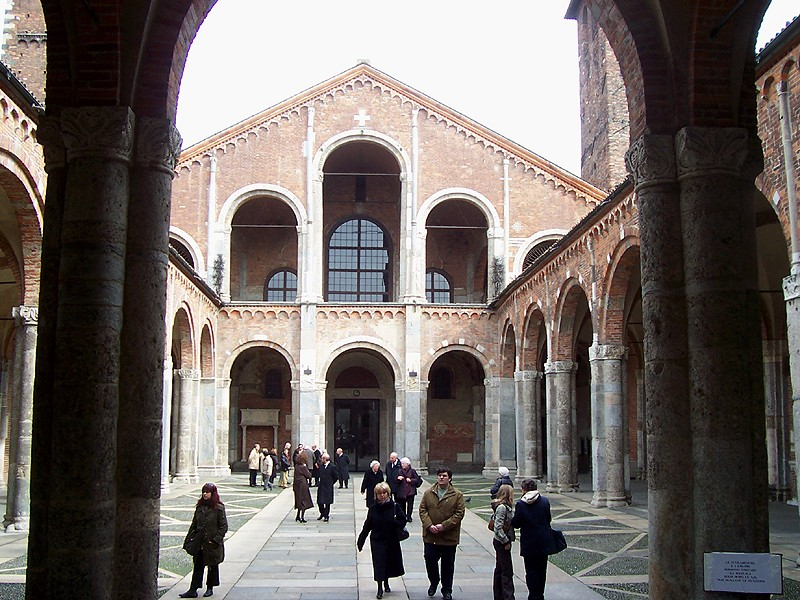 Milano - Basilica di S. Ambrogio